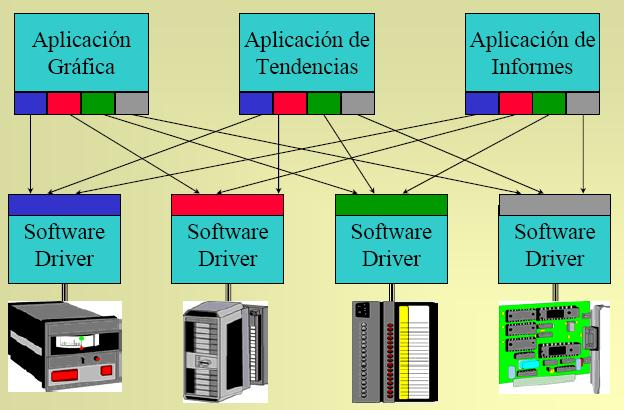 problema sin OPC